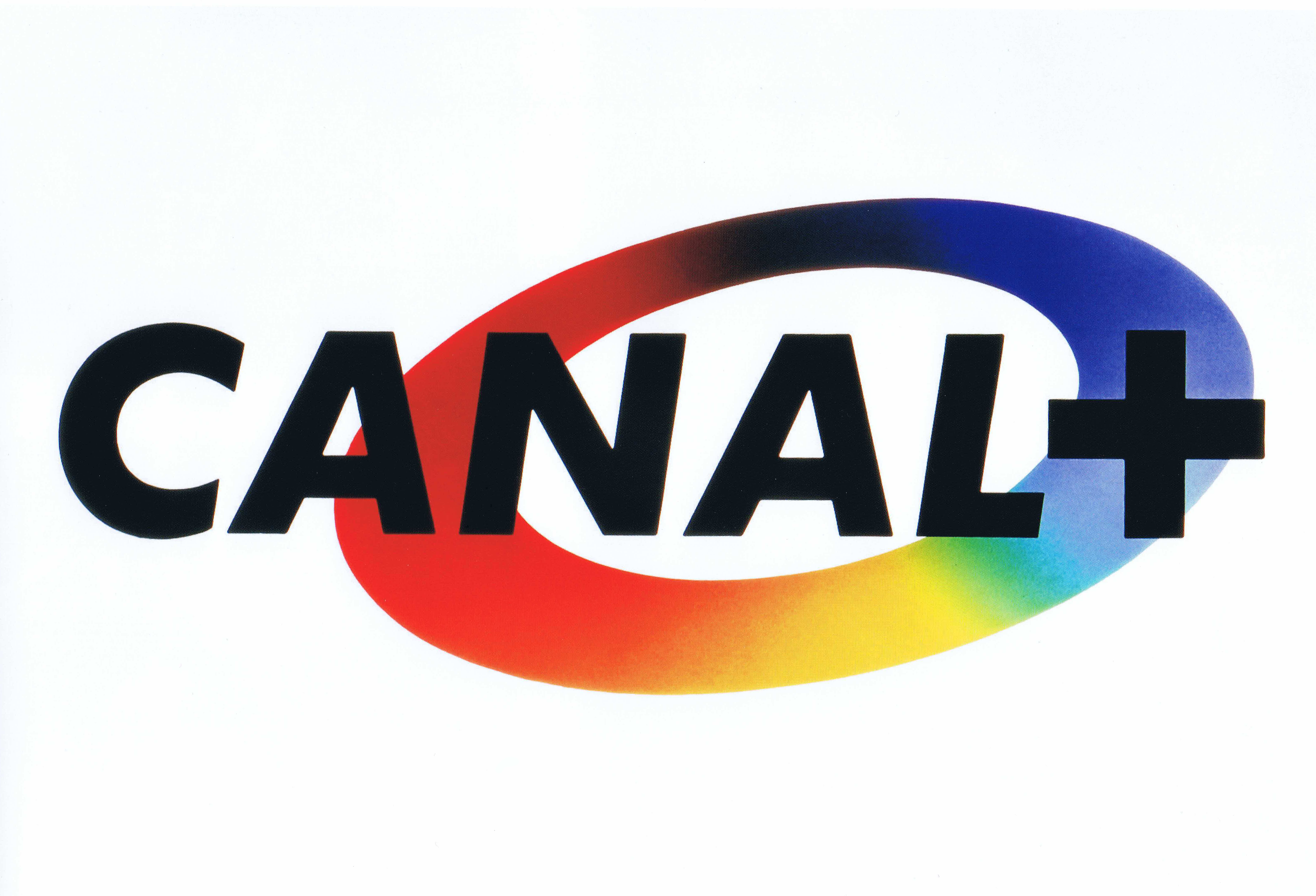 Logo Canal+ par Etienne-Robial en 1984 avec Mathias Ledoux